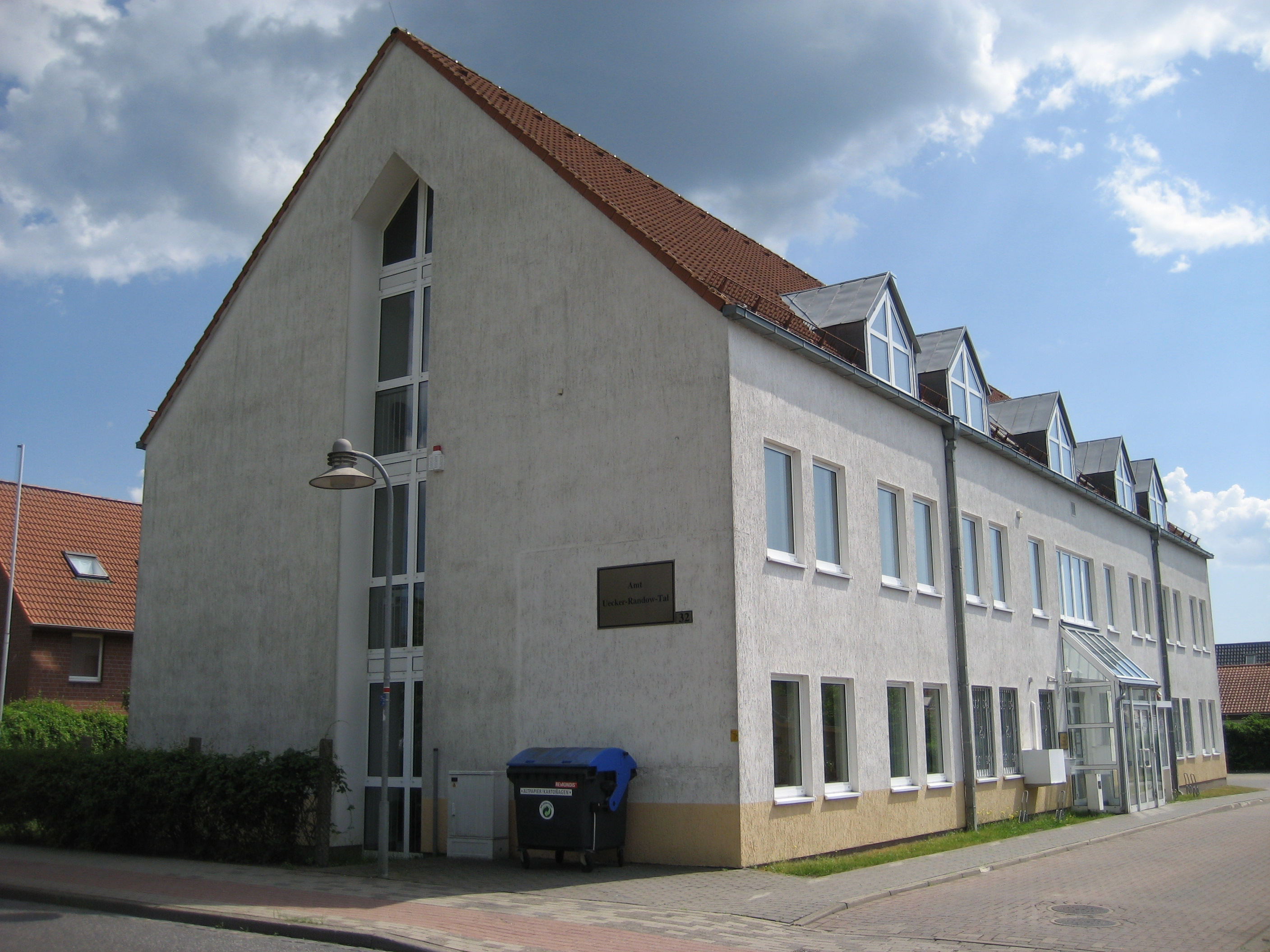 Das Gebäude des Amtes Uecker-Randow-Tal in der Lindenstraße 32 in Pasewalk.